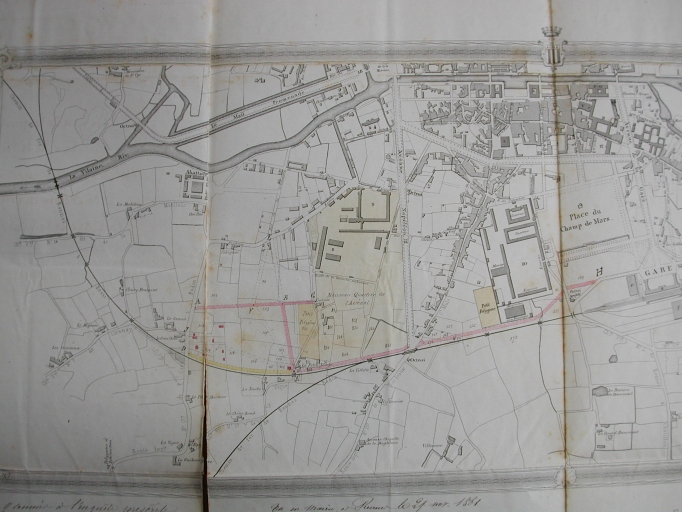 Ancien chemin vicinal n° 24, dit boulevard Solférino, boulevard de Beaumont, boulevard du Colombier et boulevard de Guines (Rennes) - Plan annexé au dossier de classement de la voie en 1861 (A. C. Rennes)